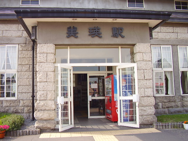 美瑛駅入口 (Biei Station)